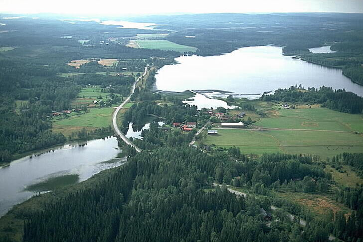 Motiv: Asphyttan Nyckelord: Flygbilder, Riksintressen Kategori: InsjömiljöerAsphyttan